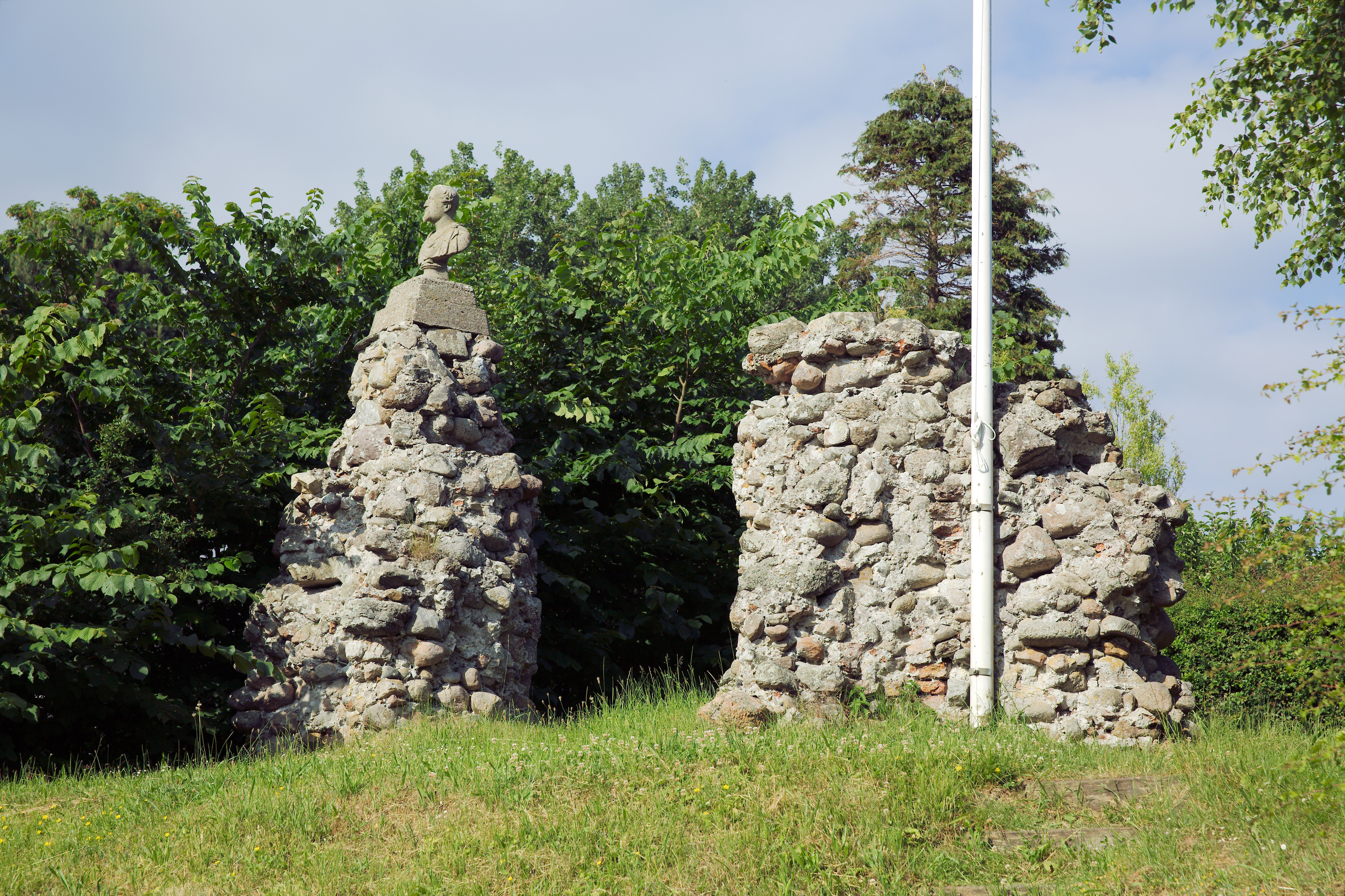 Meden kirkeruin, nærbillede